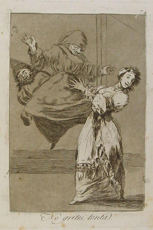 Capricho nº 74: No grites, tonta de Goya, serie Los Caprichos